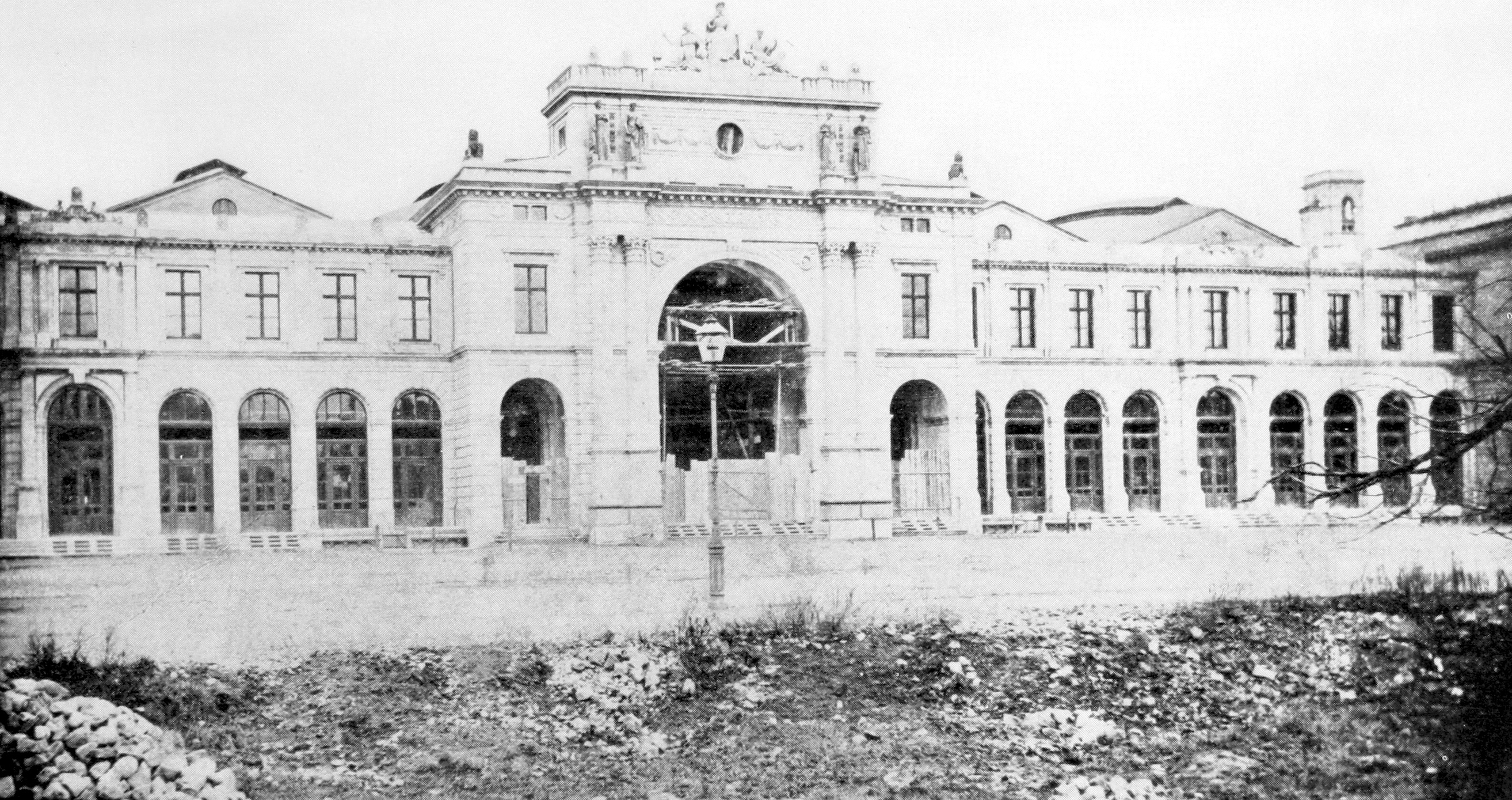 frühestes Bild des Zürcher Hauptbahnhofs, September 1871